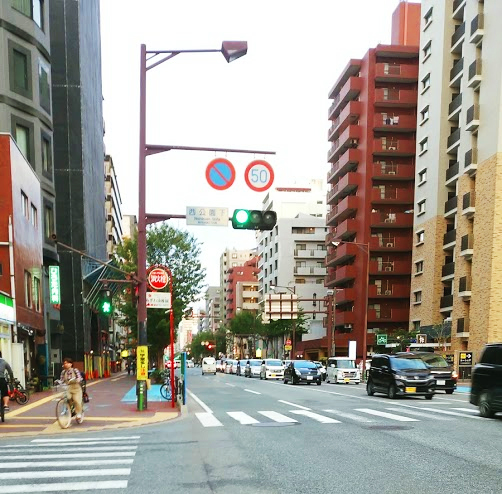 荒戸の風景（那の津通）